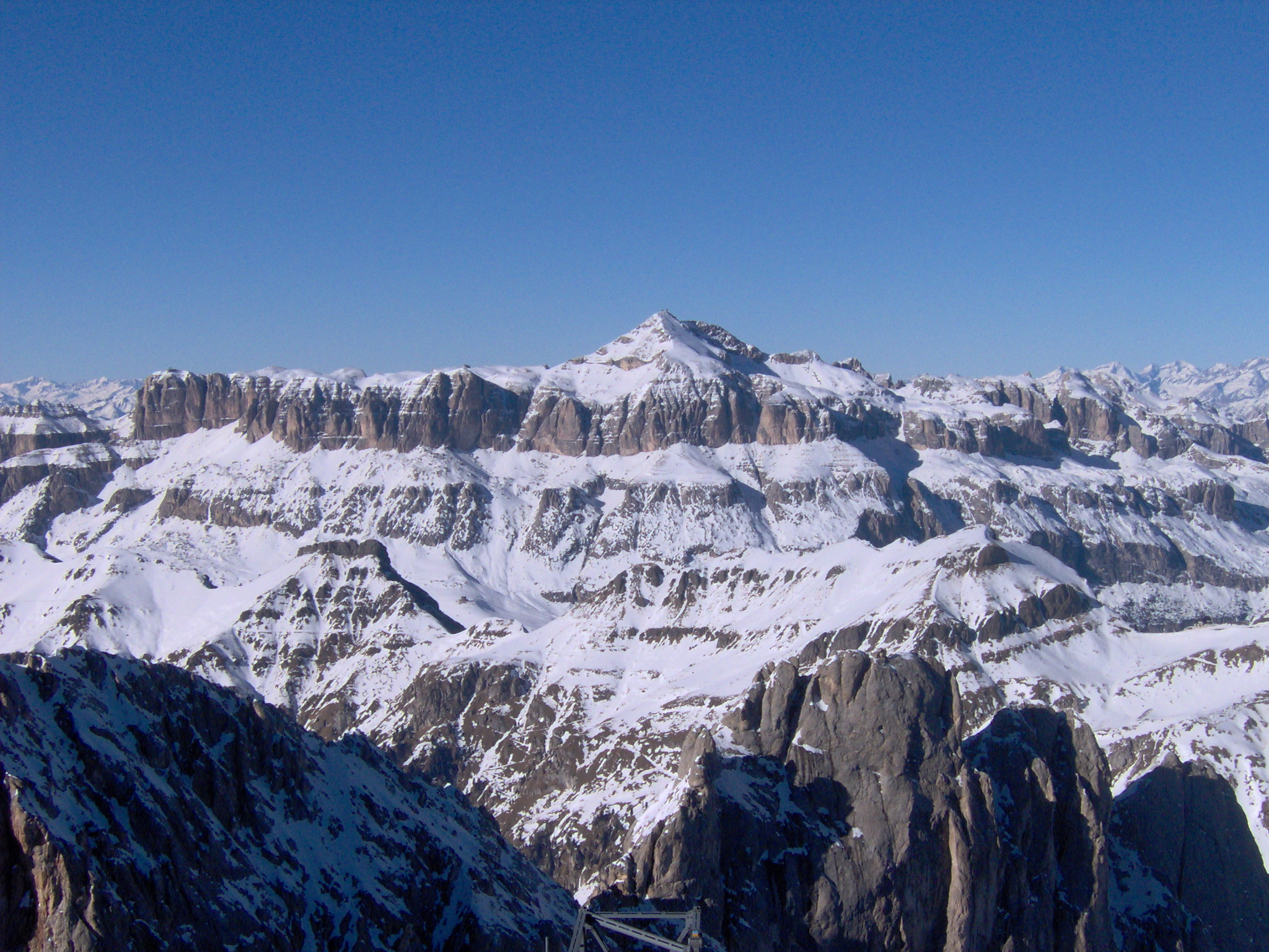 Gruppo Sella visto dalla Marmolada